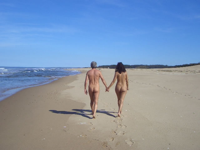 Playa naturista Chihuahua